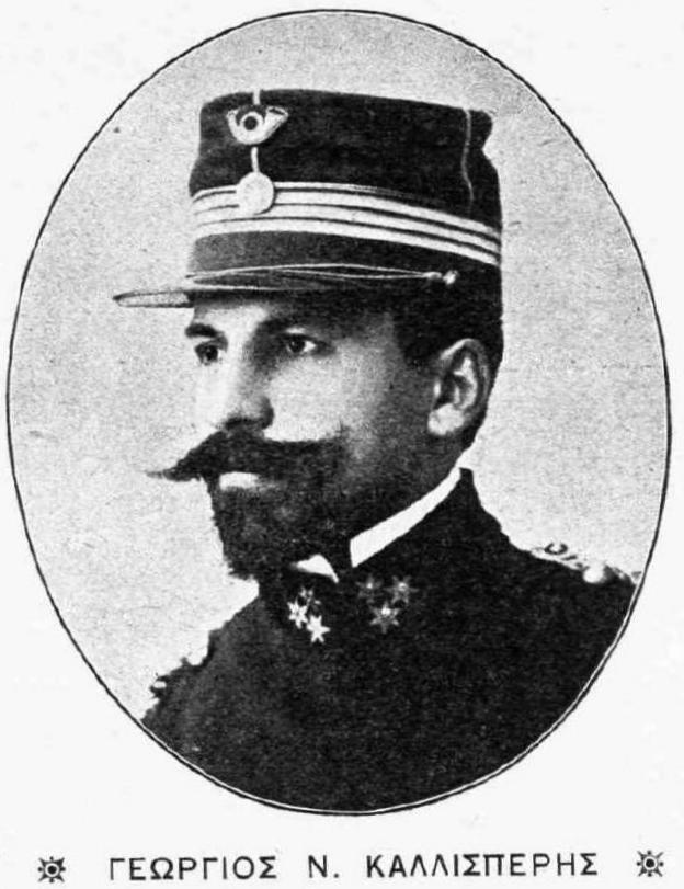 Griechischer Militär, 19. Jahrhundert